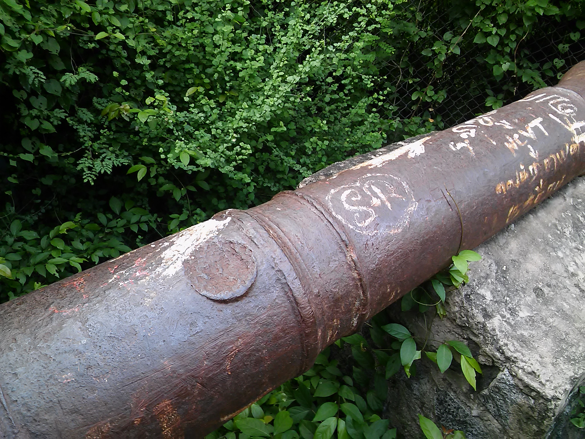 தியாகதுருகம் மலையின் மீது உள்ள பீரங்கி